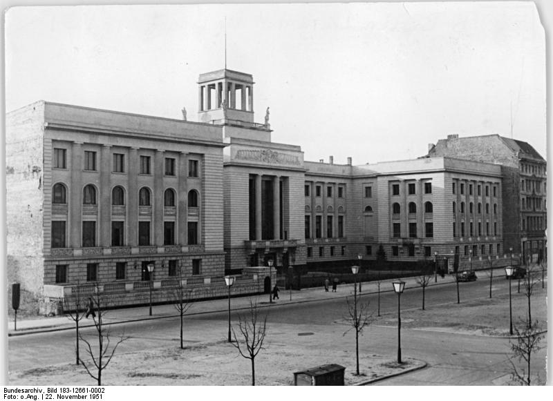 Berlin, Unter den Linden, Amtssitz des Sowjetischen Kommandanten Zentralbild 22.11.1951 Der neue Amtssitz des Hohen Kommissars der UdSSR in Deutschland in Berlin, Unter den Linden.